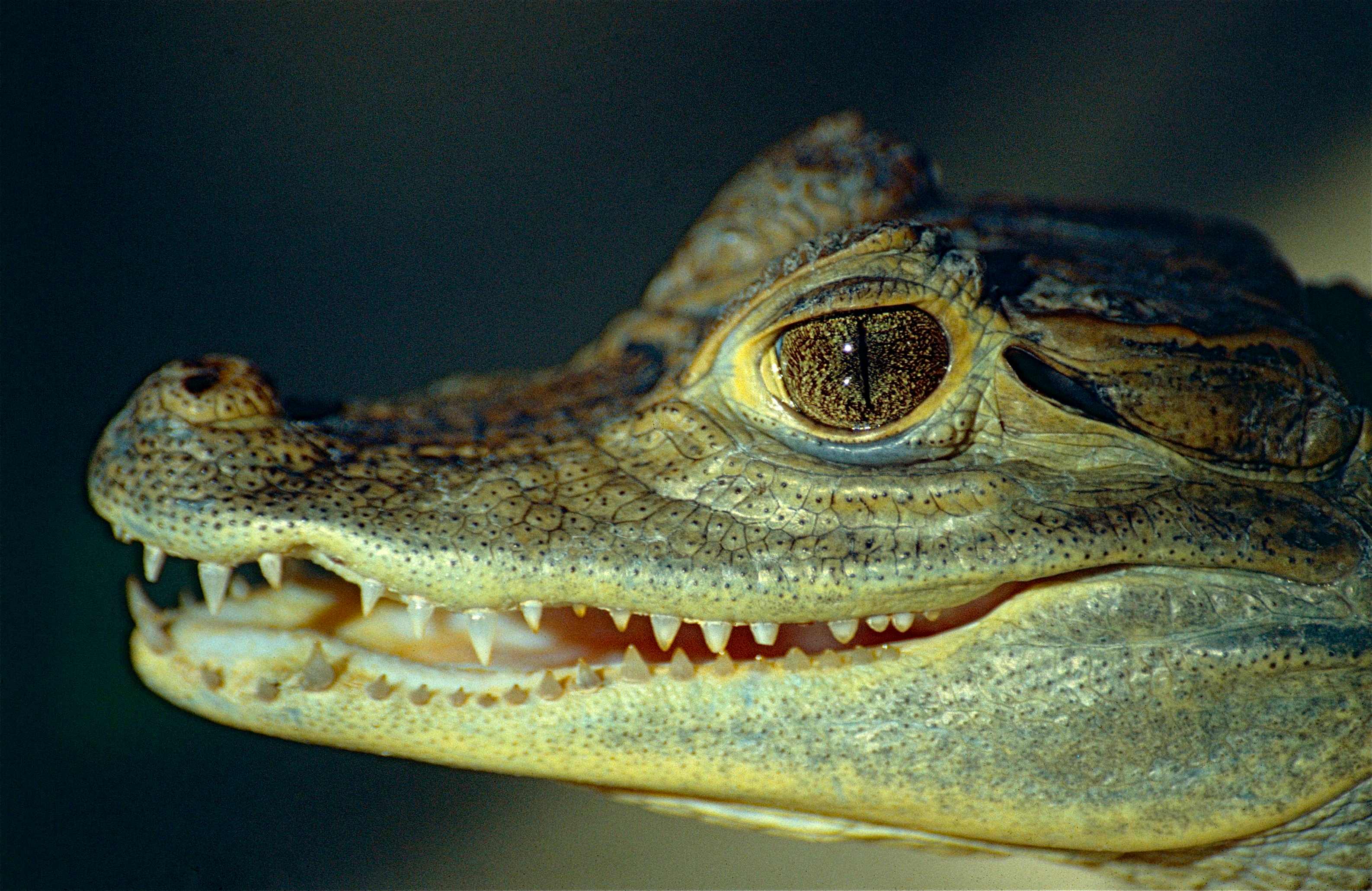 Ferme aux Crocodiles, Pierrelatte, FRANCE Scanned Slide from 2000